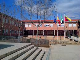 IES Sierra la Calera